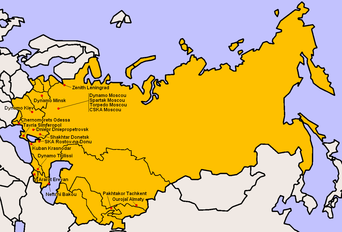 Clubs participants à la Division Supérieure 1981.